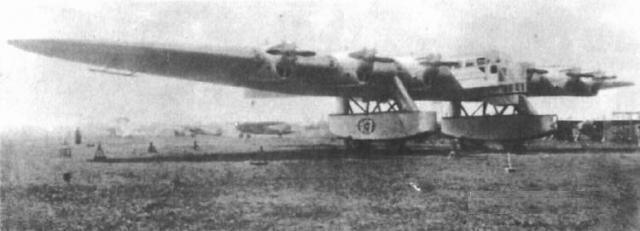 Семимоторный самолёт-гигант КБ Калинина К-7 в Харькове на аэродроме Харьковского авиационного завода: Kalinin K-7